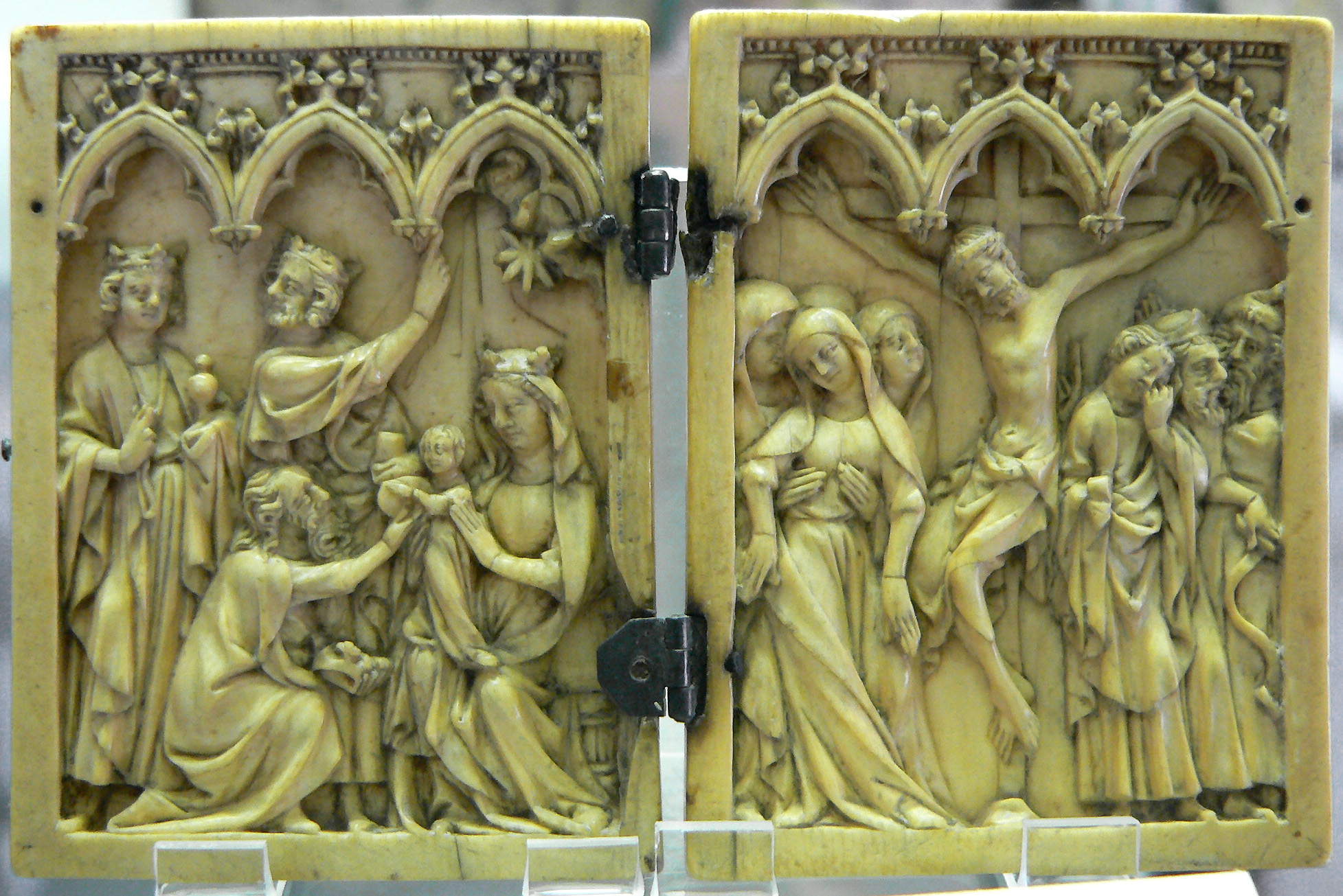 Diptyque d'ivoire Adoration des mages - Crucifixion. Paris. Vers 1350